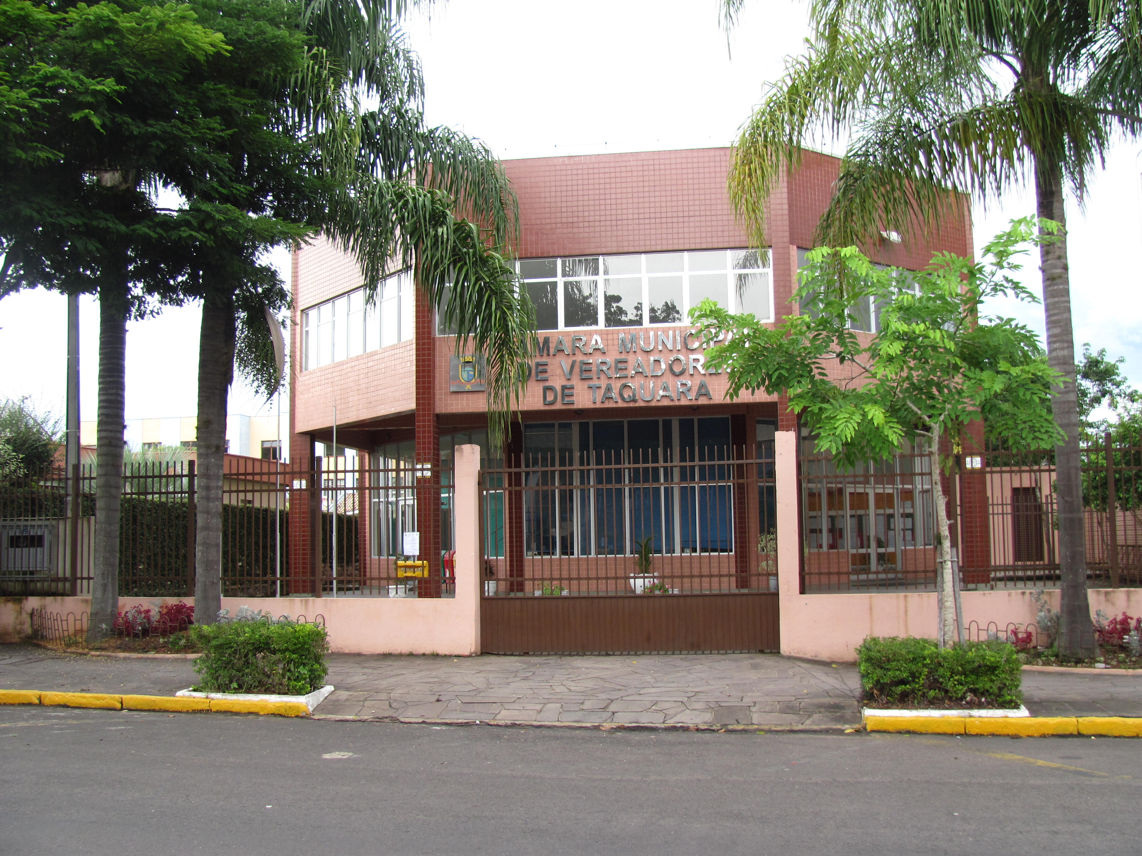 Câmara de Vereadores de Taquara